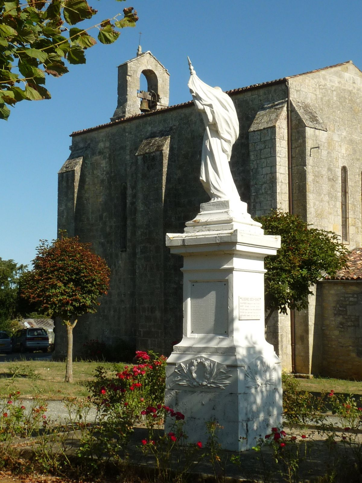 église et monument aux morts de St-André-de-Lidon (17), France